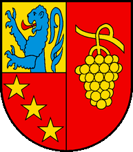 Wappen von Mezieres (Neu) Kanton Freiburg Schweiz